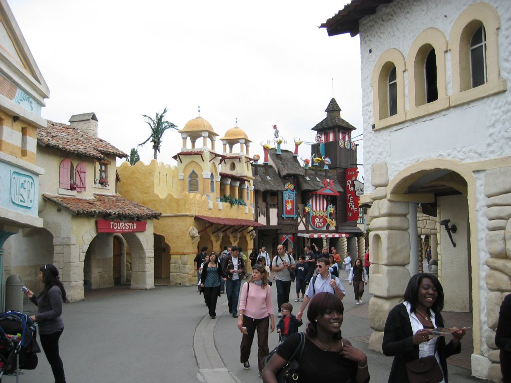 Parc Asterix - Paris - France